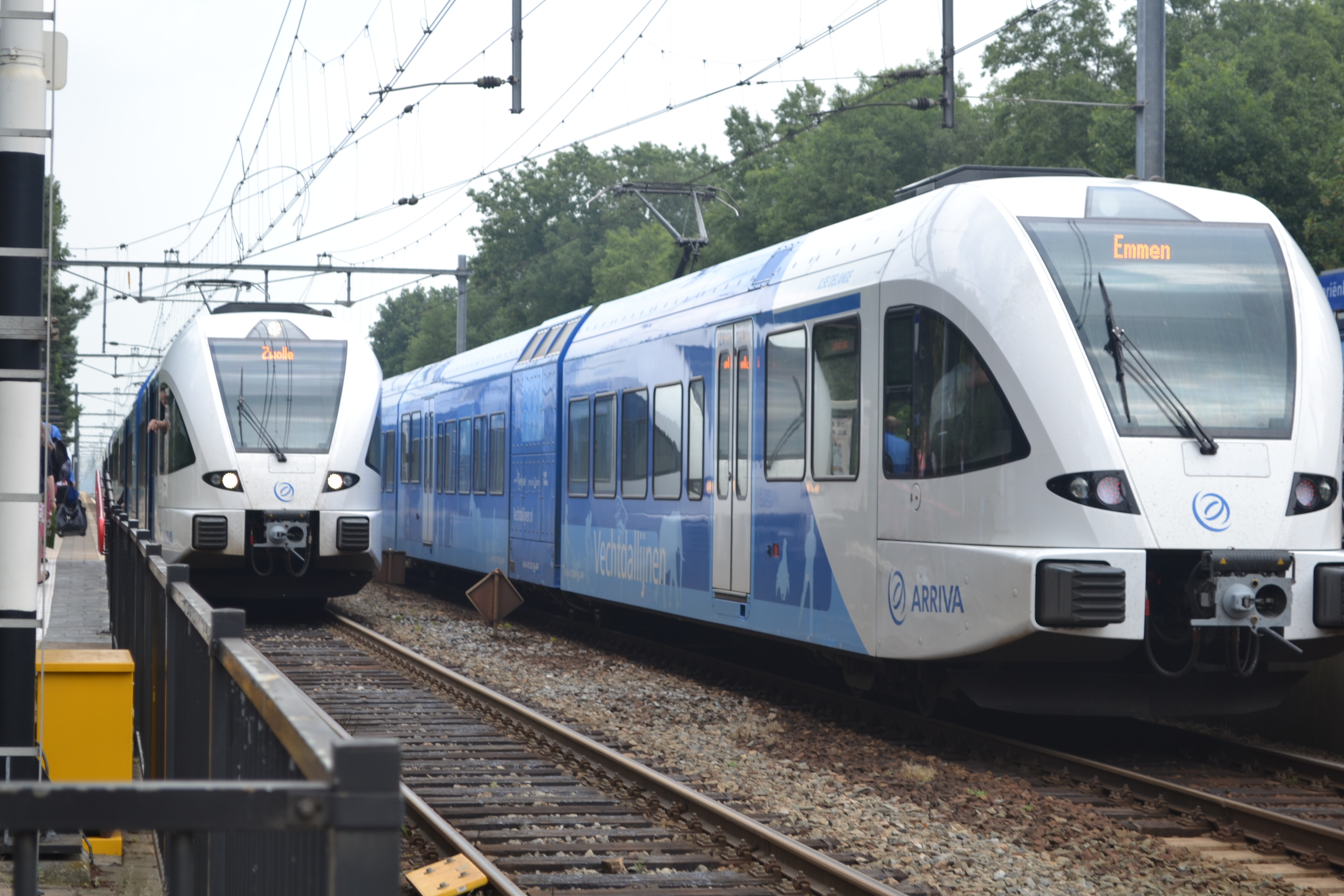 Twee GTW-stellen van de Arriva-Vechtdallijnen, te Mariënberg